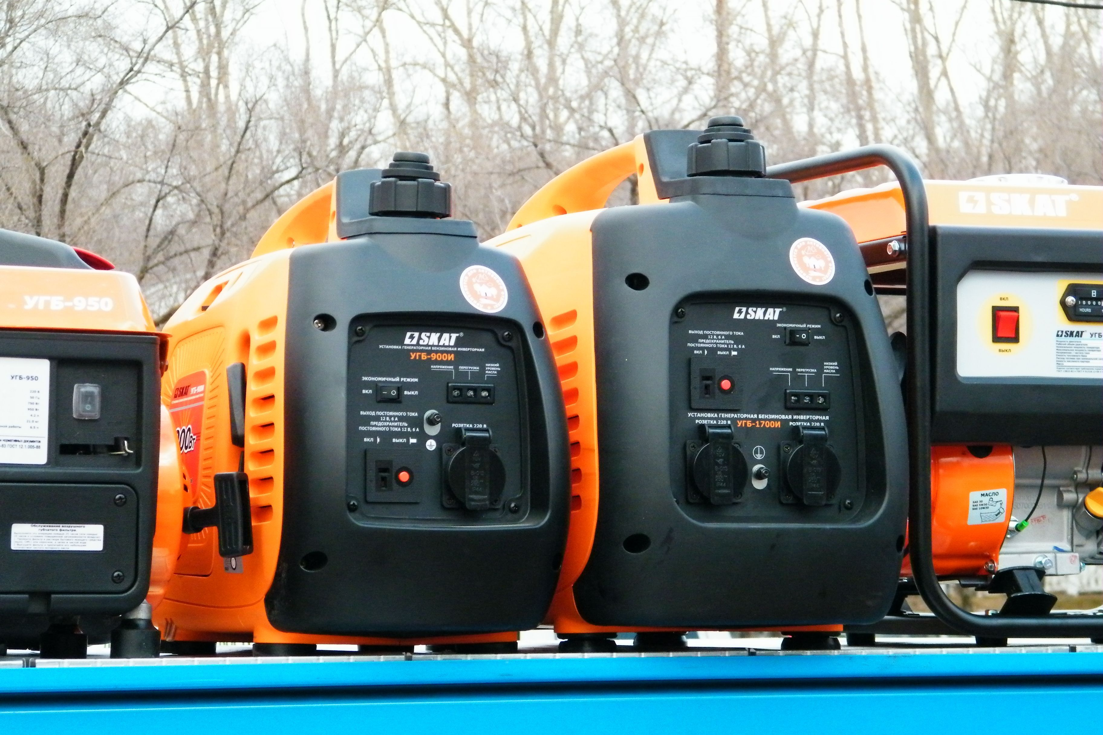 Бензогенератор